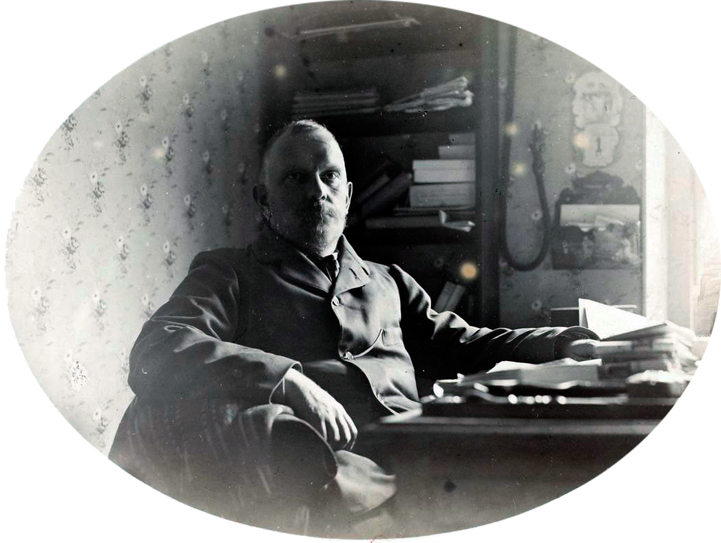 Jules Renard chez lui par Dornac